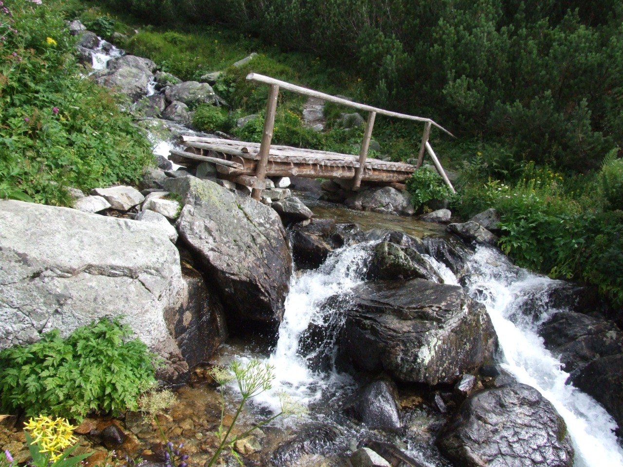 Potok Bystra (Tatry Zachodnie)